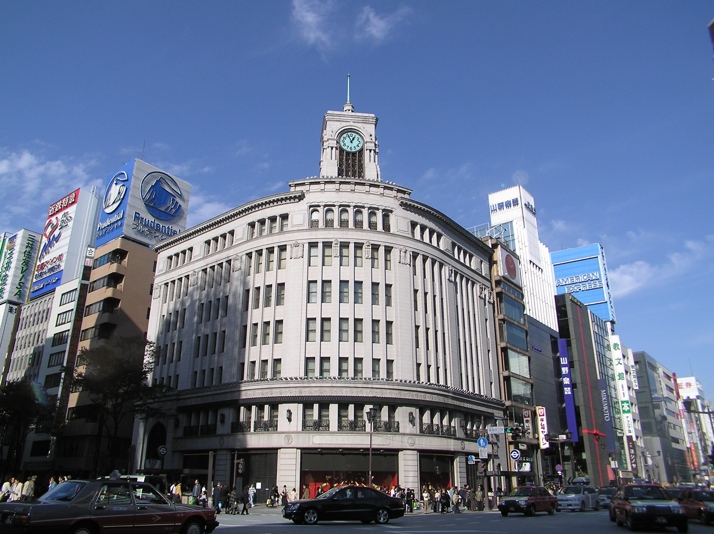 Wako